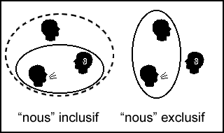 schèma expliquant la différence entre le "nous" inclusif et le "nous" exclusif